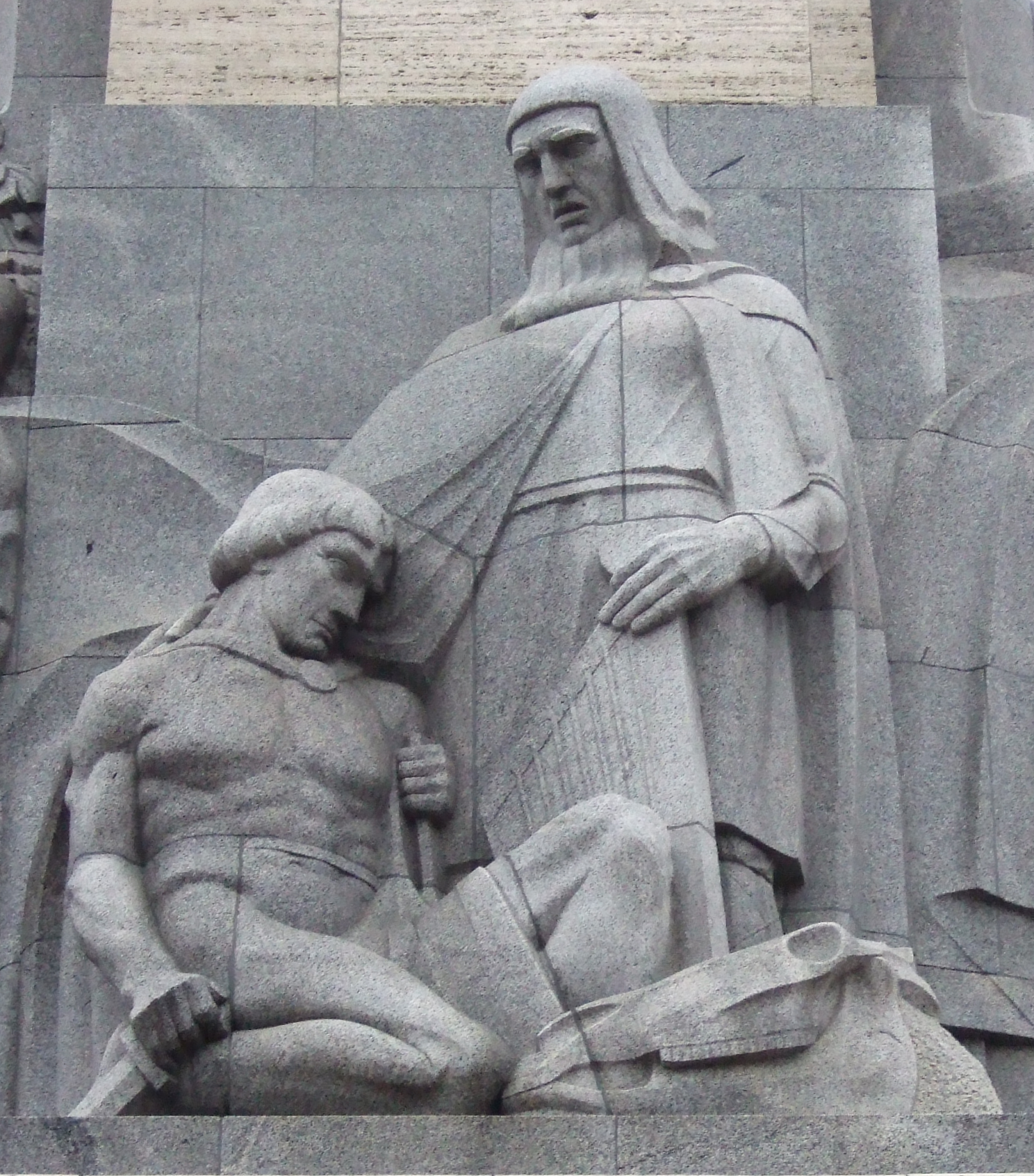 Freedom Monument, Riga, Latvia, "Vaidelotis" figure group